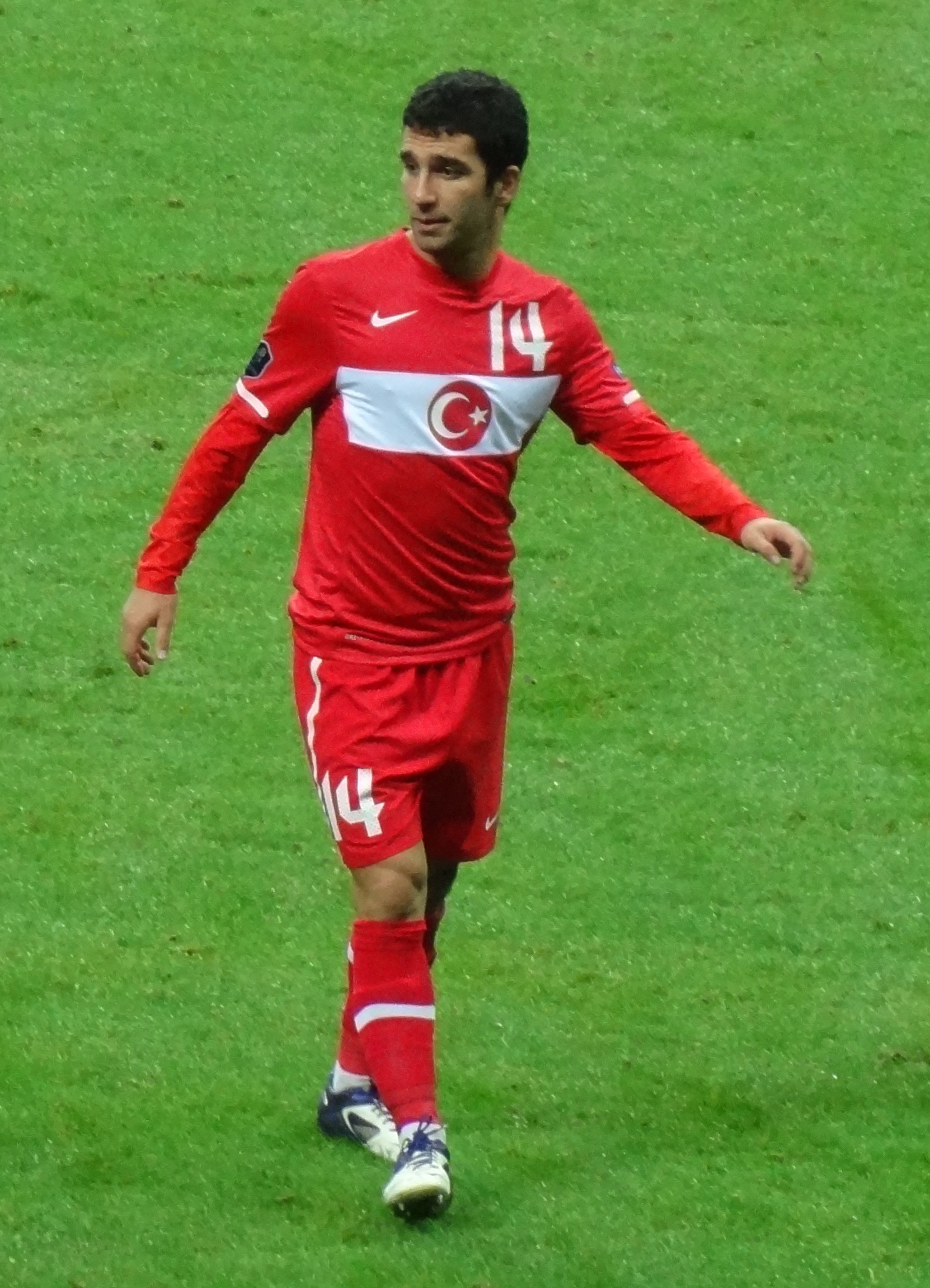 Arda Turan Türkiye formasıyla